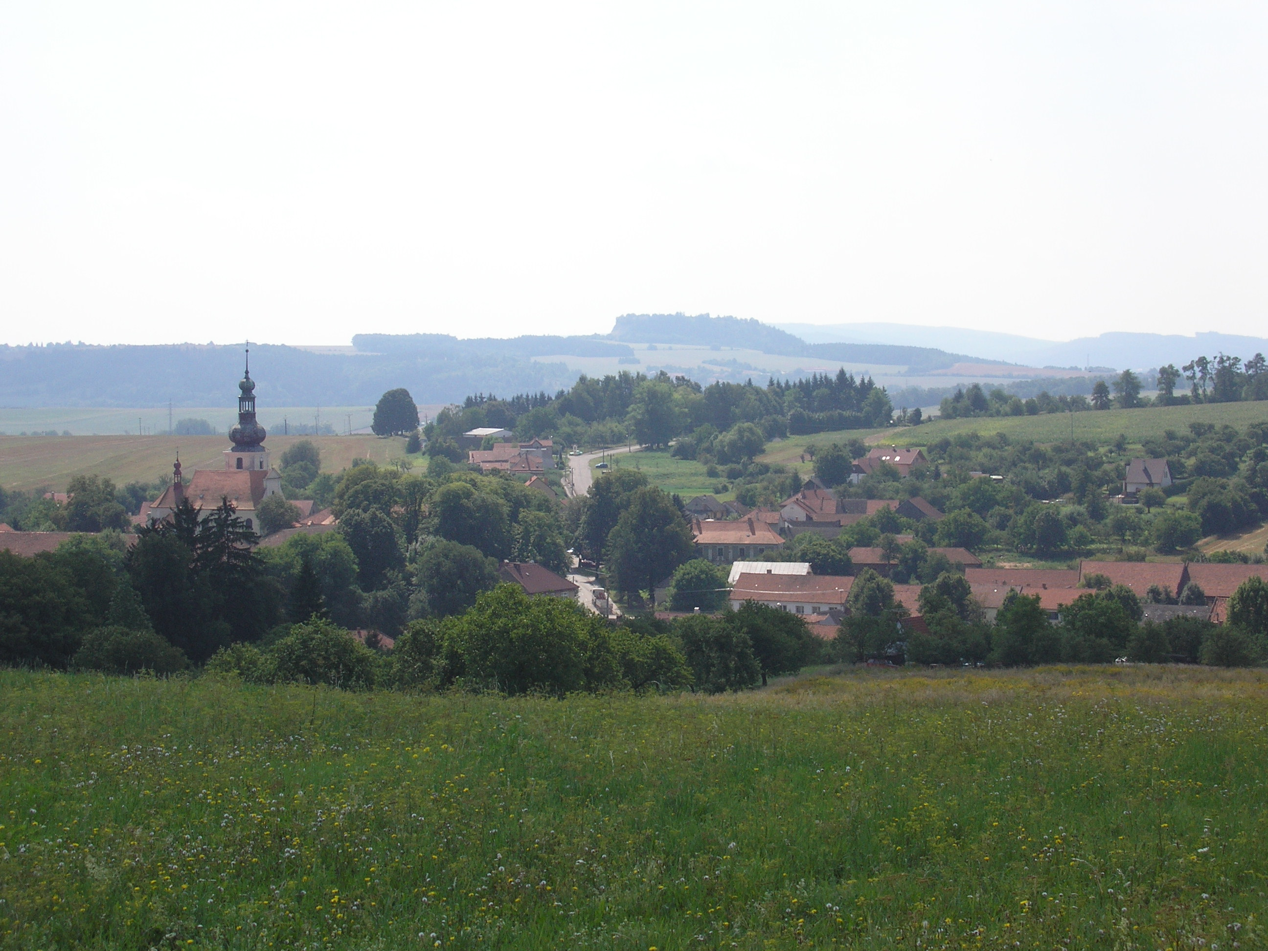 Sebranice